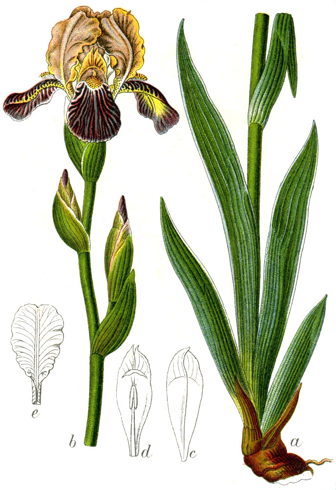 Iris × germanica L., syn. Iris × sambucina L.Formula hybridae: Iris pallida Lam. × I. variegata L. Original Caption Holunder-Schwertlilie, Iris sambucina